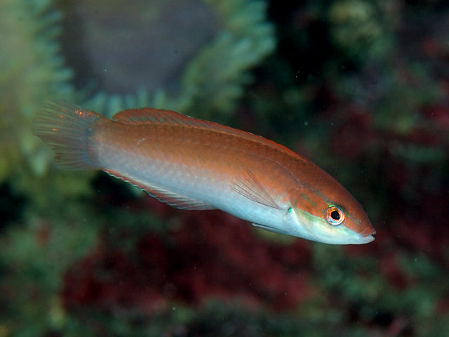 ホンベラ Halichoeres tenuispinis